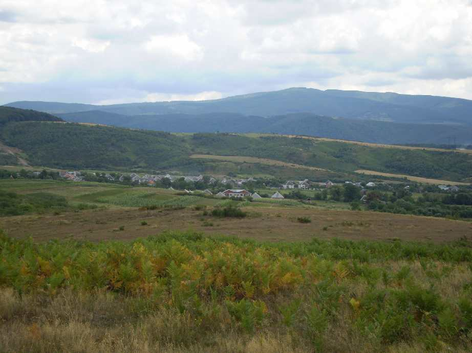 Краєвид мукачевських передмість. В долині - село Обава.